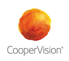 [Lizenz für CooperVision Logo]